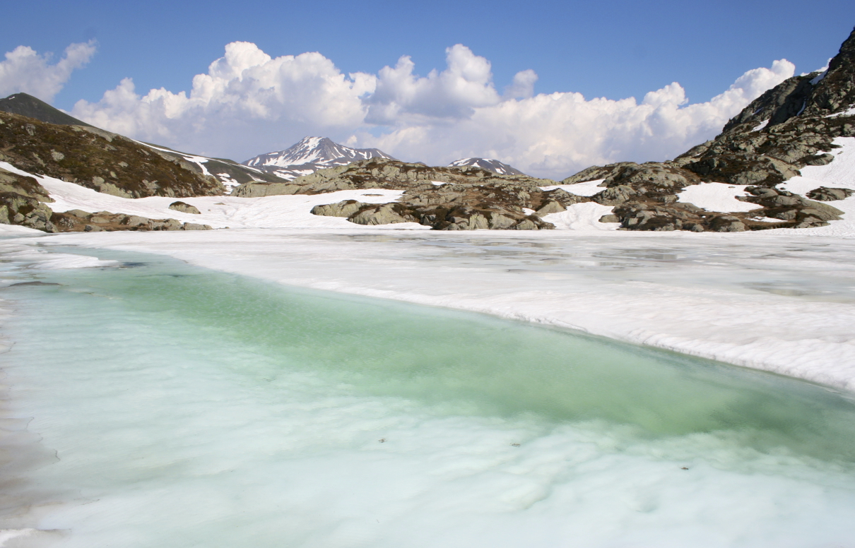 Lacs des Tempêtes, au dessus de La Léchère, à la fonte des neiges, surplombant la commune de Cevins